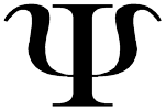 psychology logo